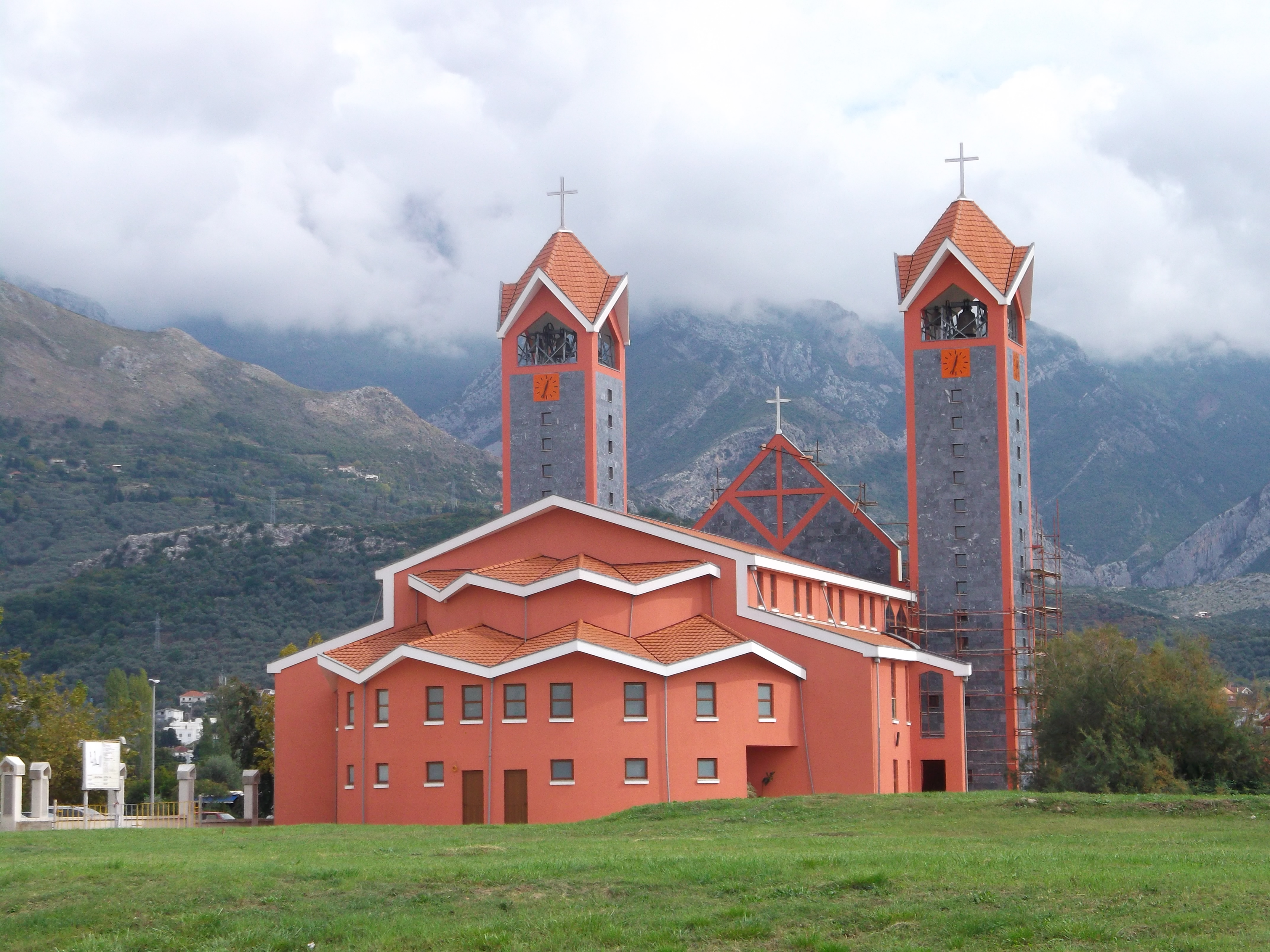 Bar, Montenegro